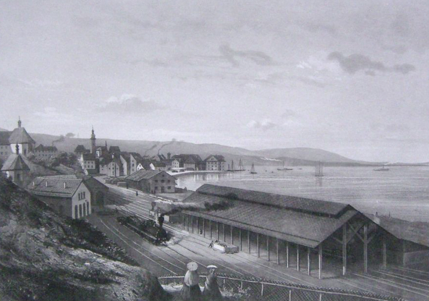 Rorschach, Blick vom Osten über den Bahnhof auf die Stadt, Lithographie von Huber nach Geißer bei Rüdisühli, 19. Jh. ca. 14,5 x 19,5 cm